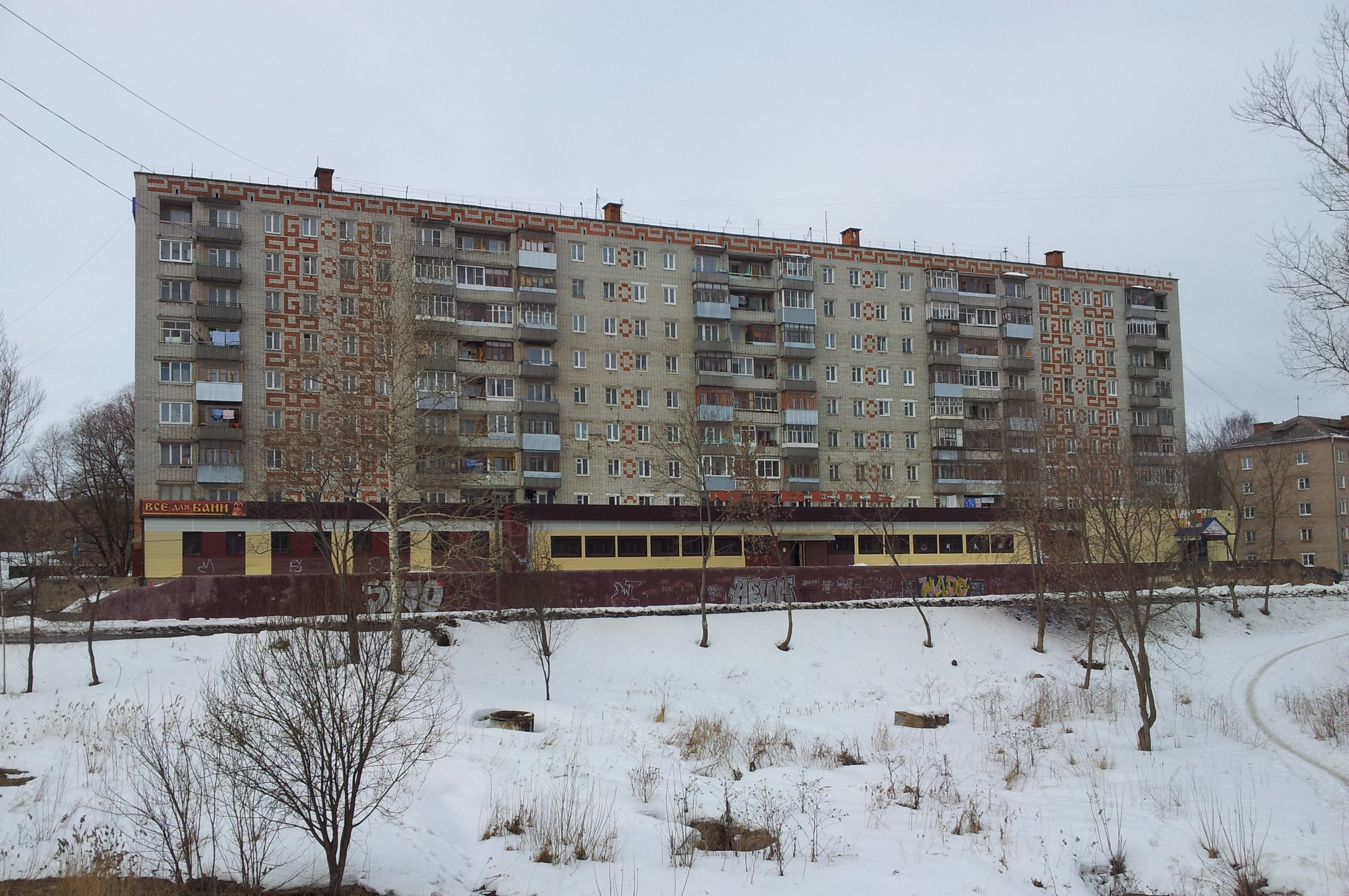 9-этажный 4-секционный жилой дом на ул. Боткина,5 в рыбинске